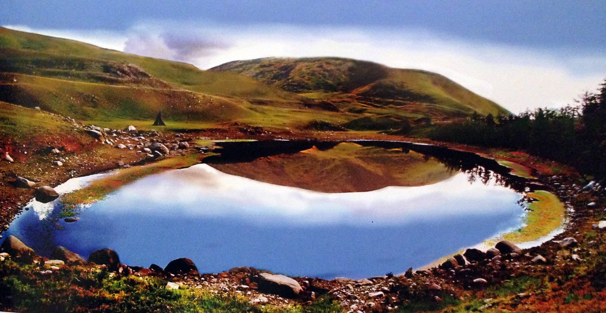 Монгол: Өлзийт гол Естийн нуур